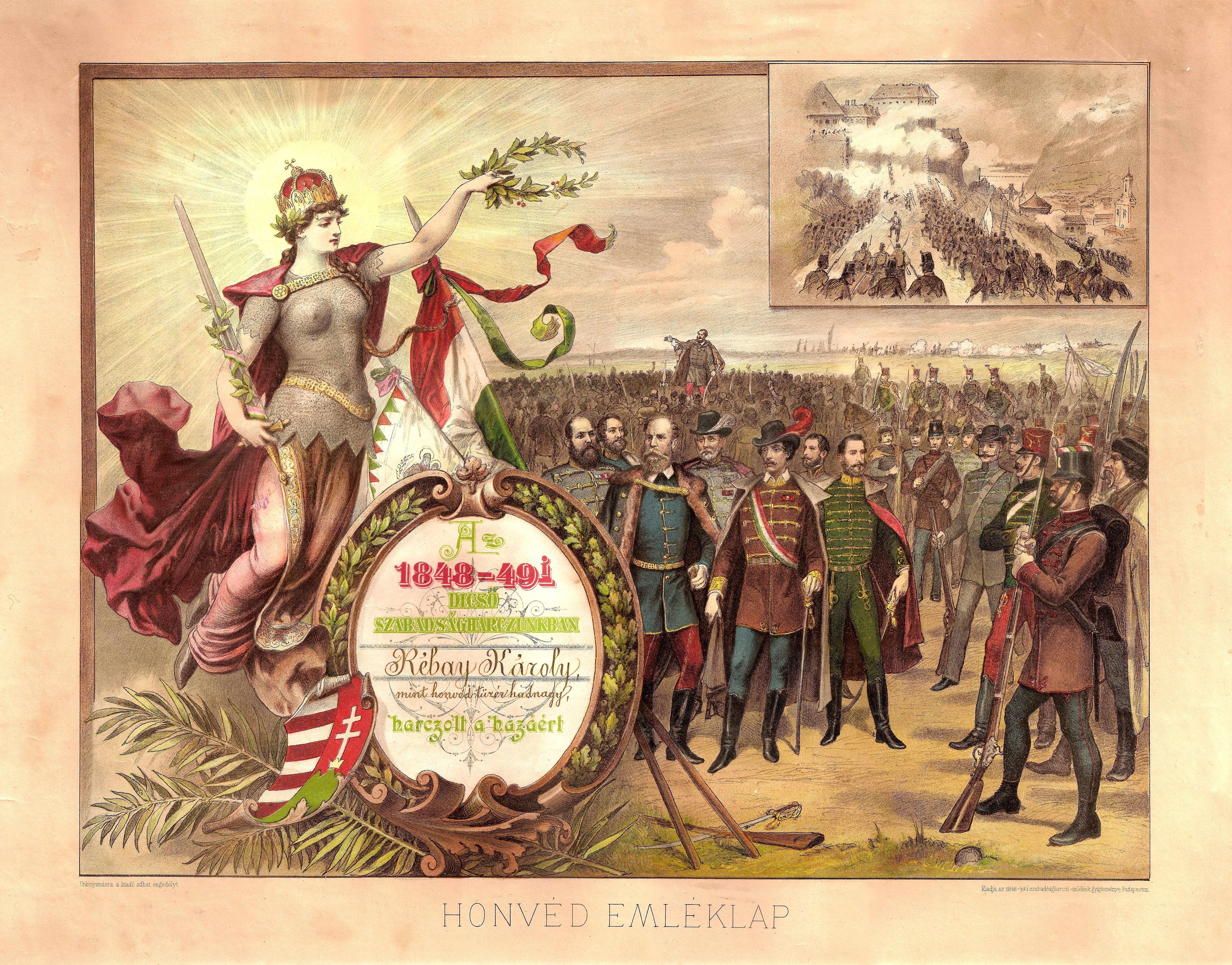 1848-49-es szabadságharci honvéd emléklap